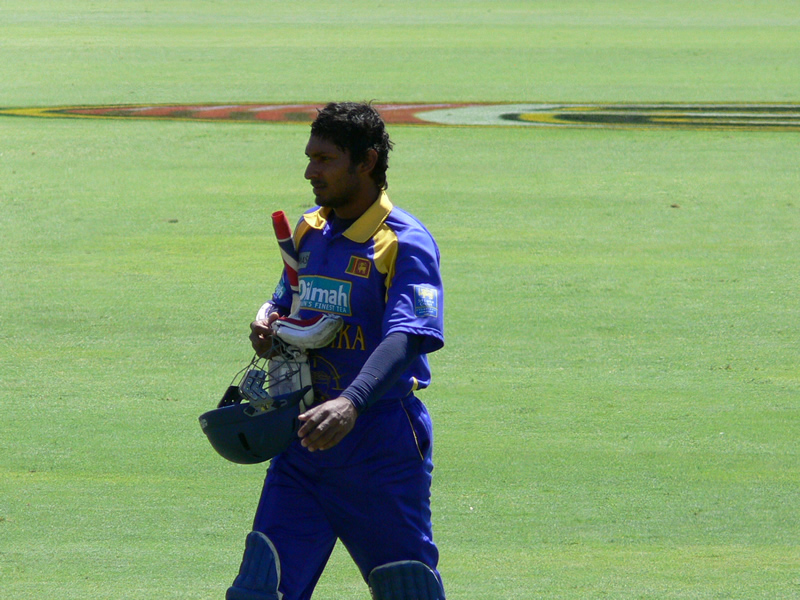 Sri Lankan cricketer Kumar Sangakkara